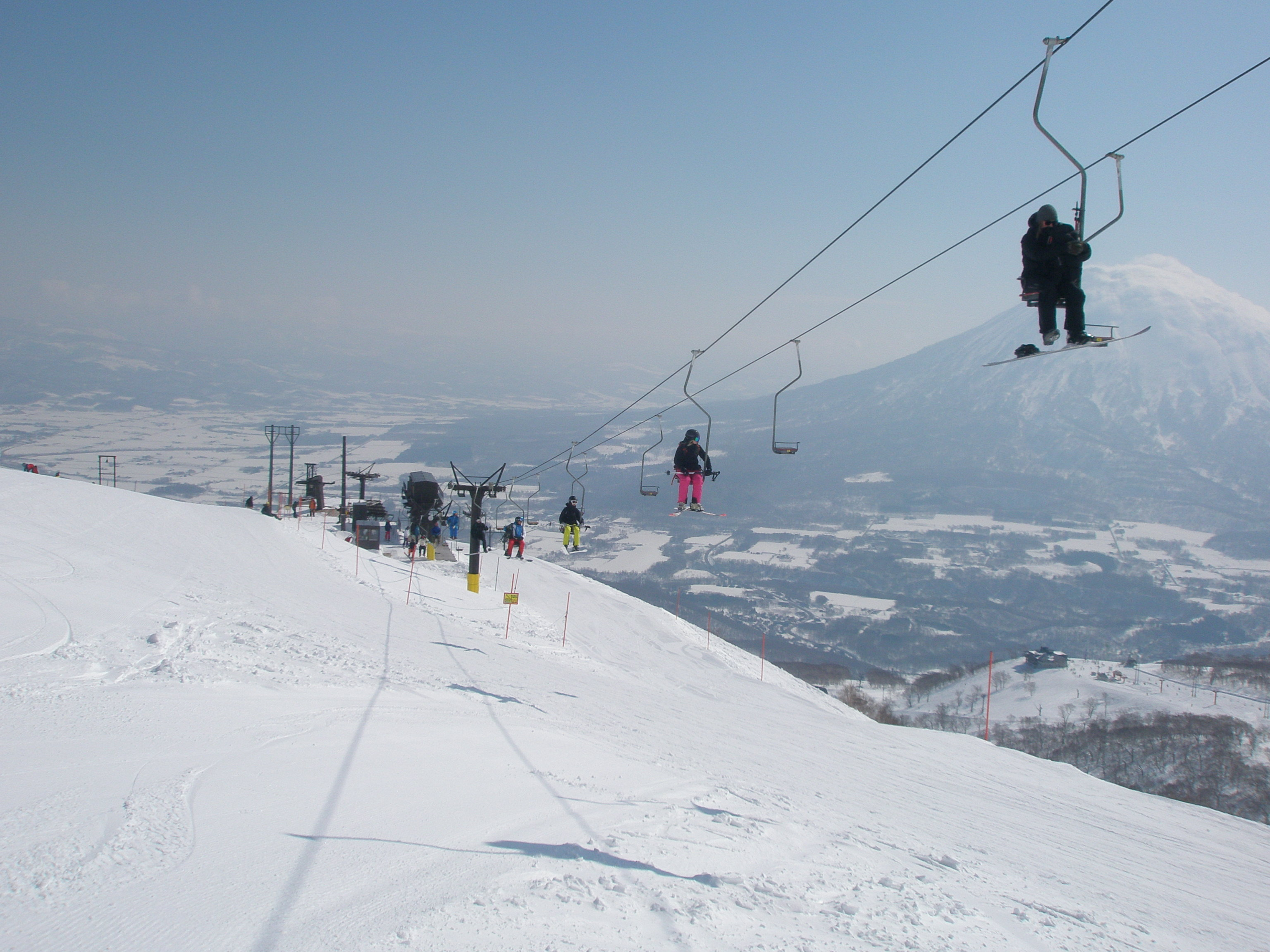 ニセコマウンテンリゾート グラン・ヒラフ キング第4（2019年3月撮影）